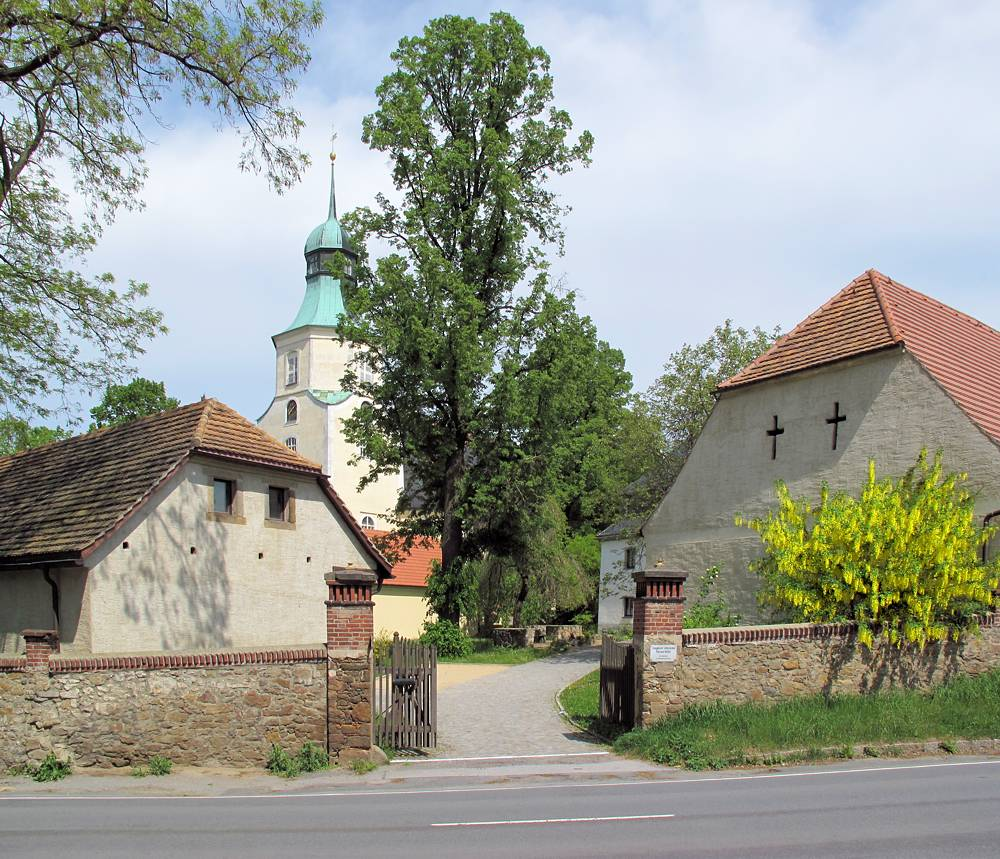 Kirche und Ev. luth. Pfarramt